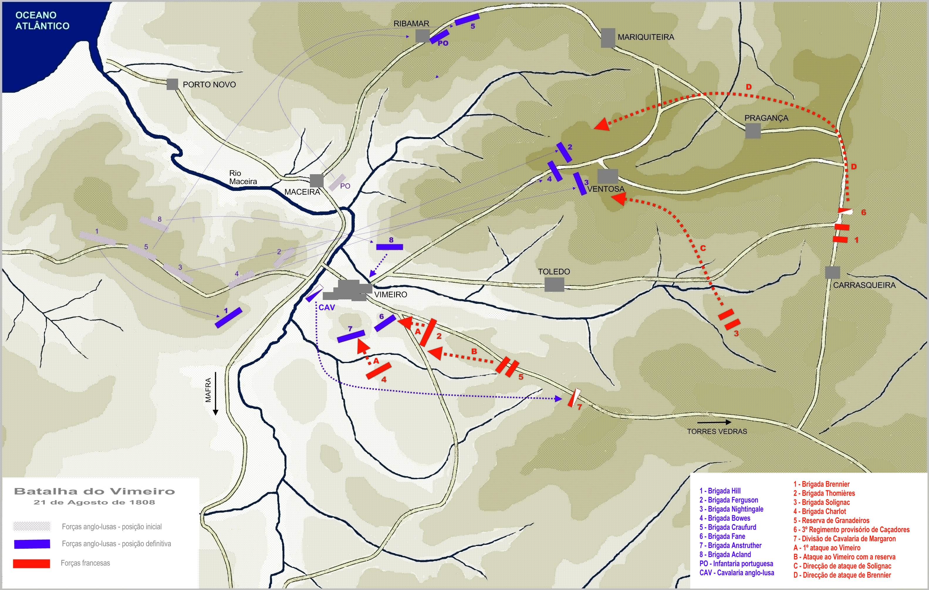 Mapa da batalha do Vimeiro contendo as posições e movimentos das principais unidades.